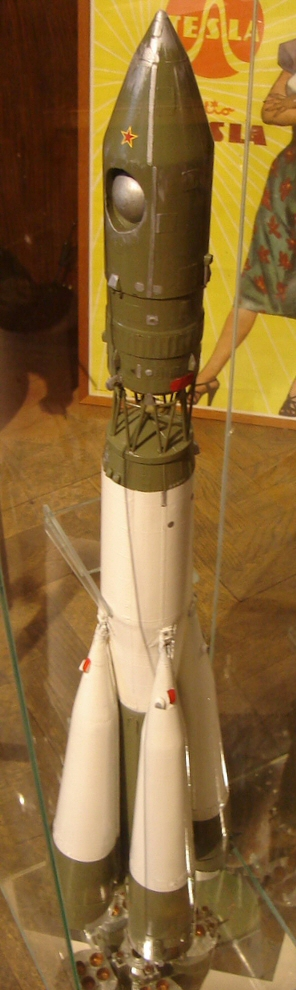 Vostok rocket model